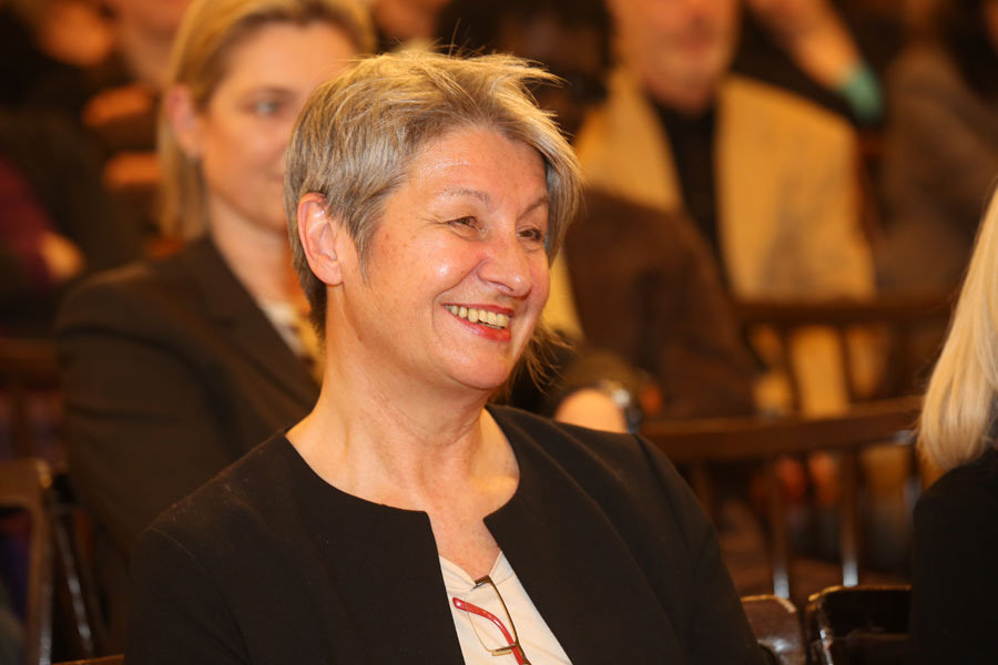 Barbara Klein-3835